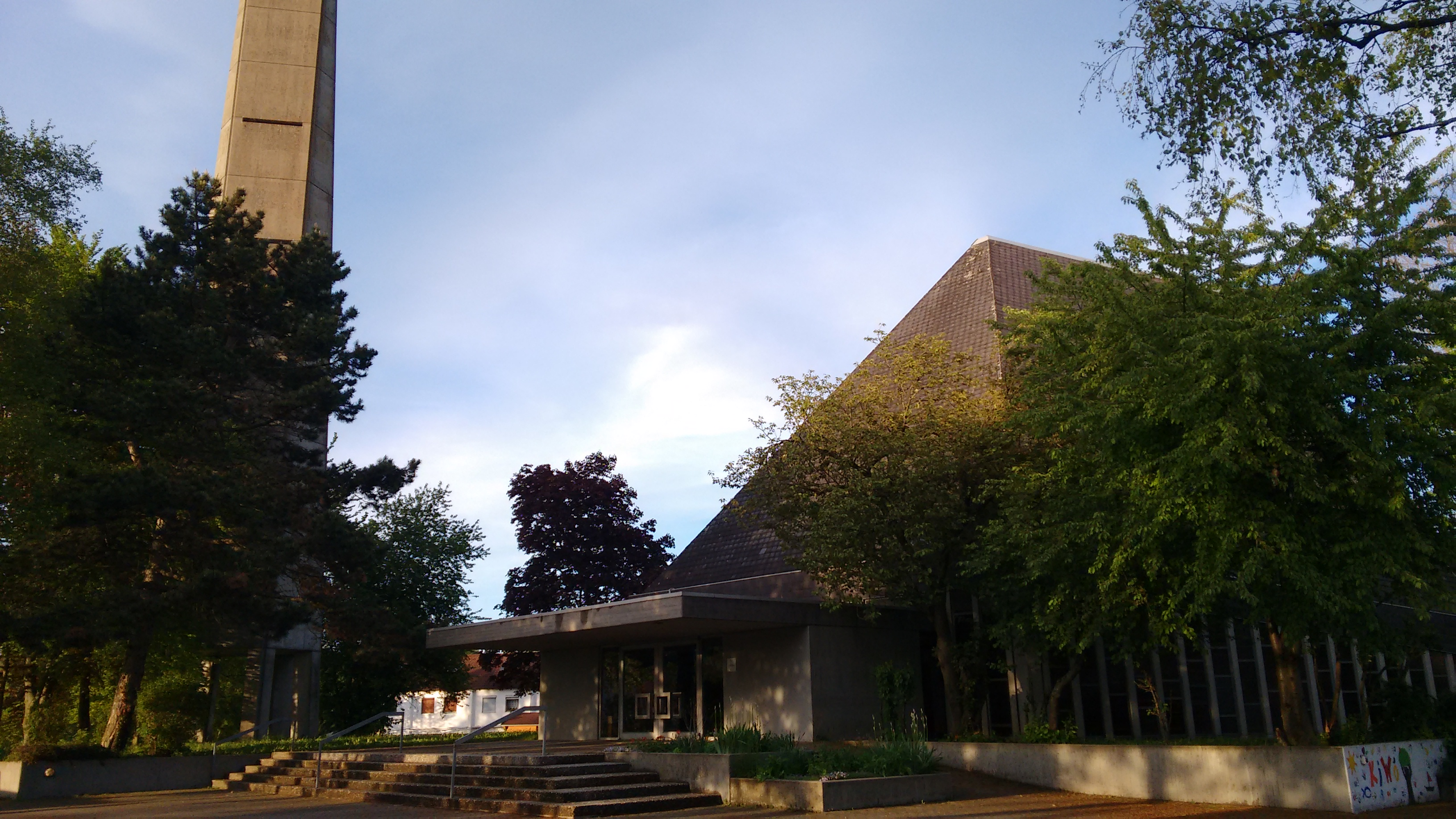 Mai 2017